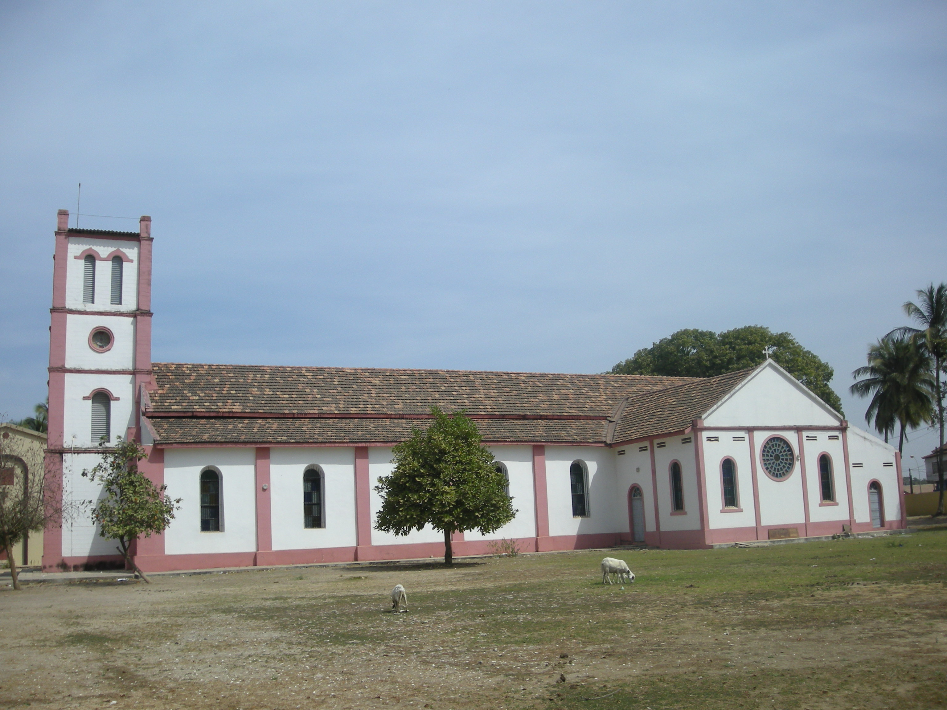 La cathédrale Saint-Antoine de padoue à Ziguinchor (Casamance, Sénégal)